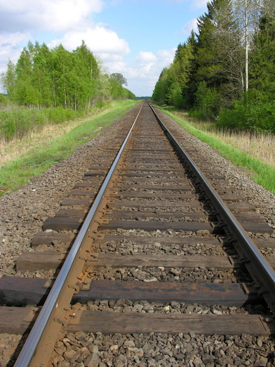 Gele?inkelis